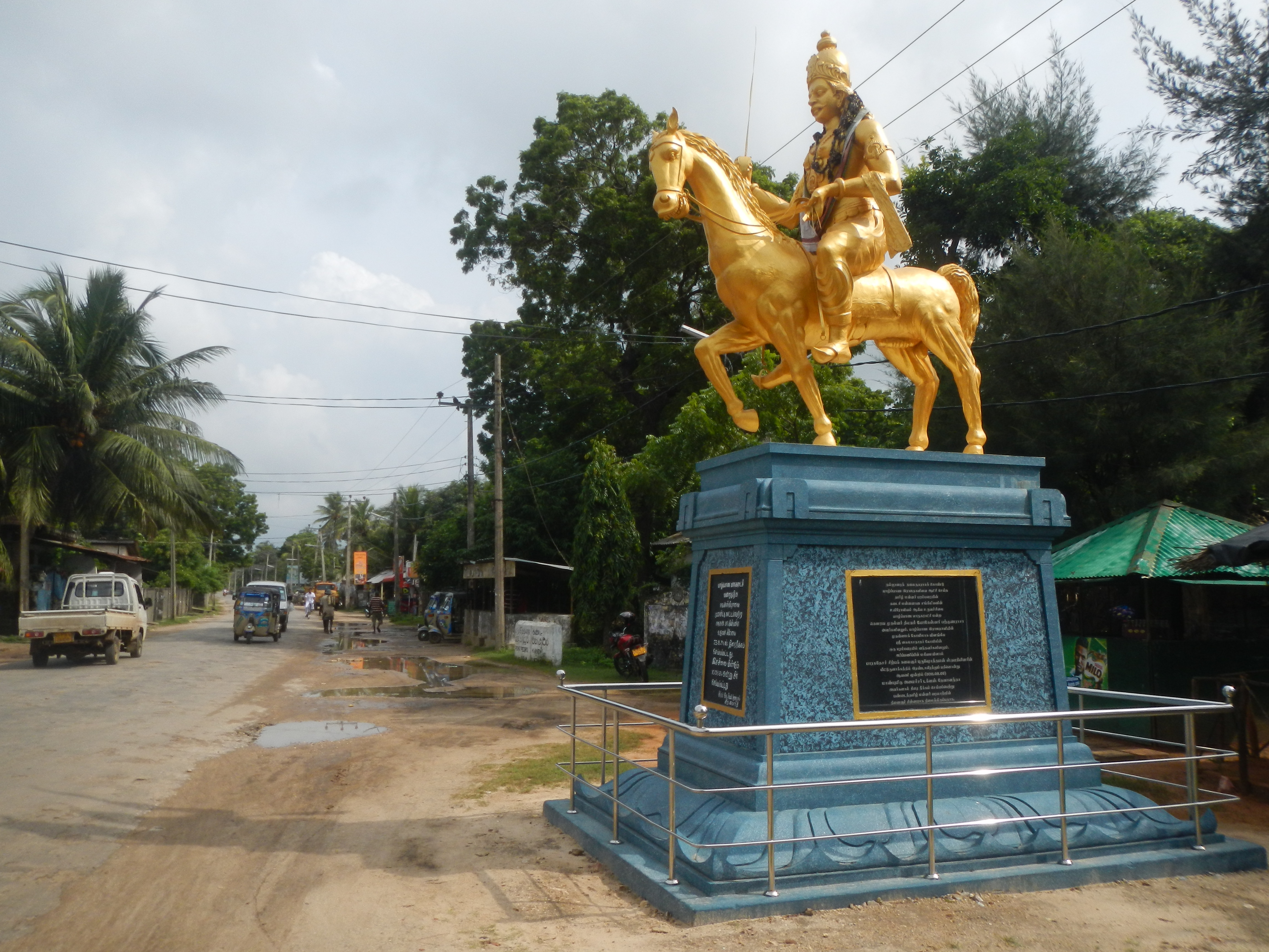 ஆக்கிரமிப்பாளர்களுக்கு எதிராகப் போரிட்ட கடைசி யாழ் மன்னர் சங்கிலி குமாரன். கட்டுரையில் மேலதிக விபரங்களைக் காண்க